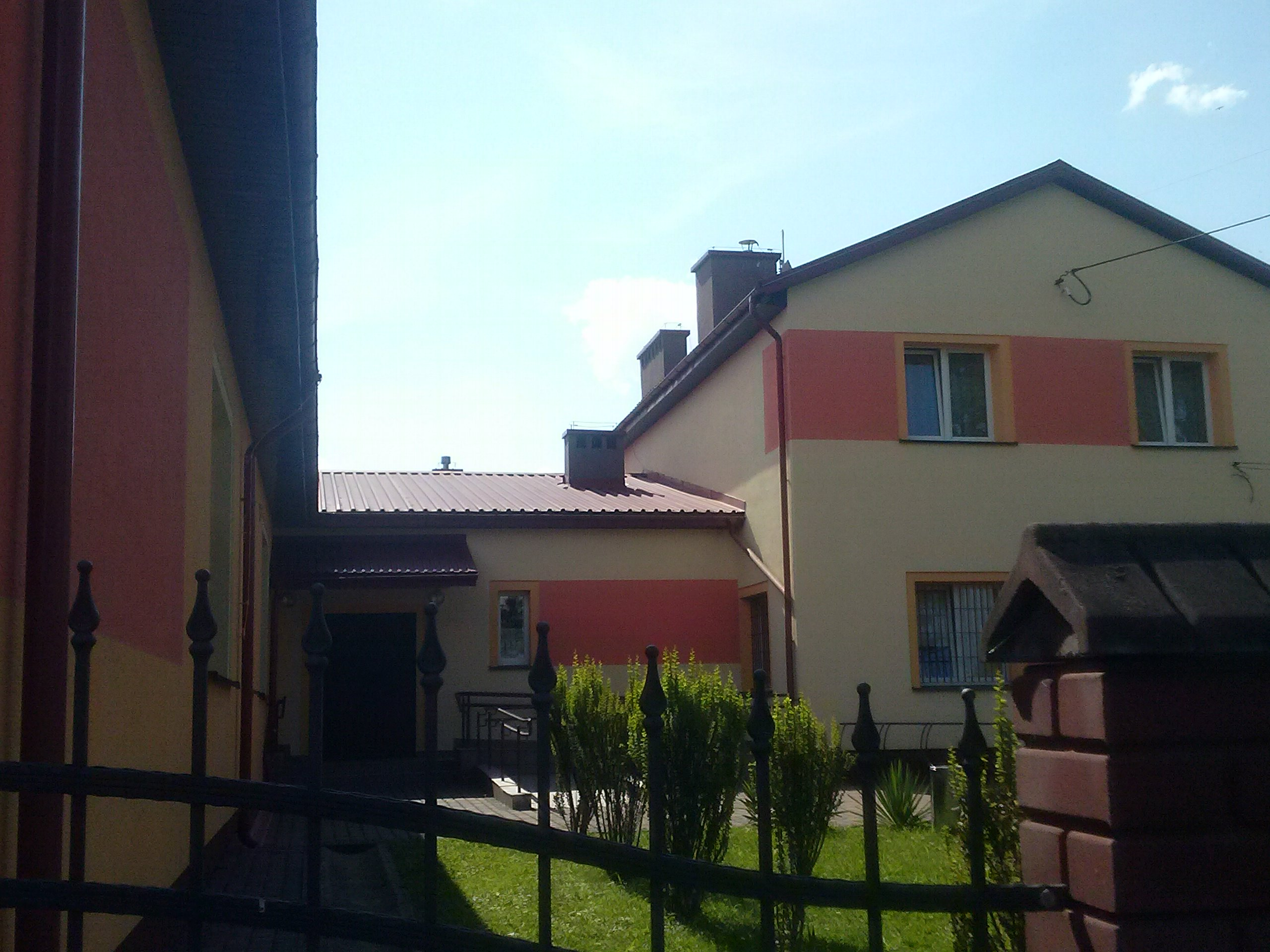 Wiejski Dom Kultury w Gniewczynie Łańcuckiej